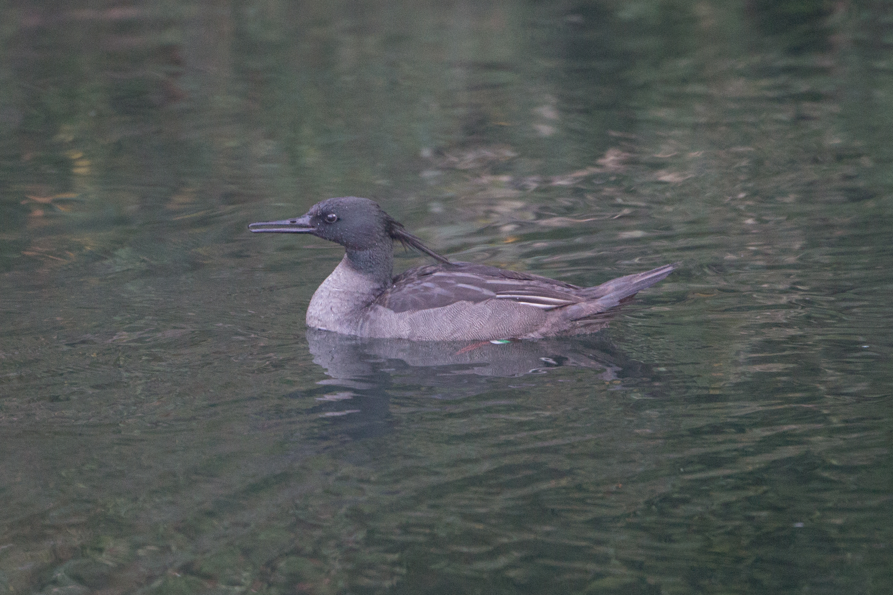 Pato-mergulhão (Mergus octosetaceus) no Parque Nacional da Serra da Canastra